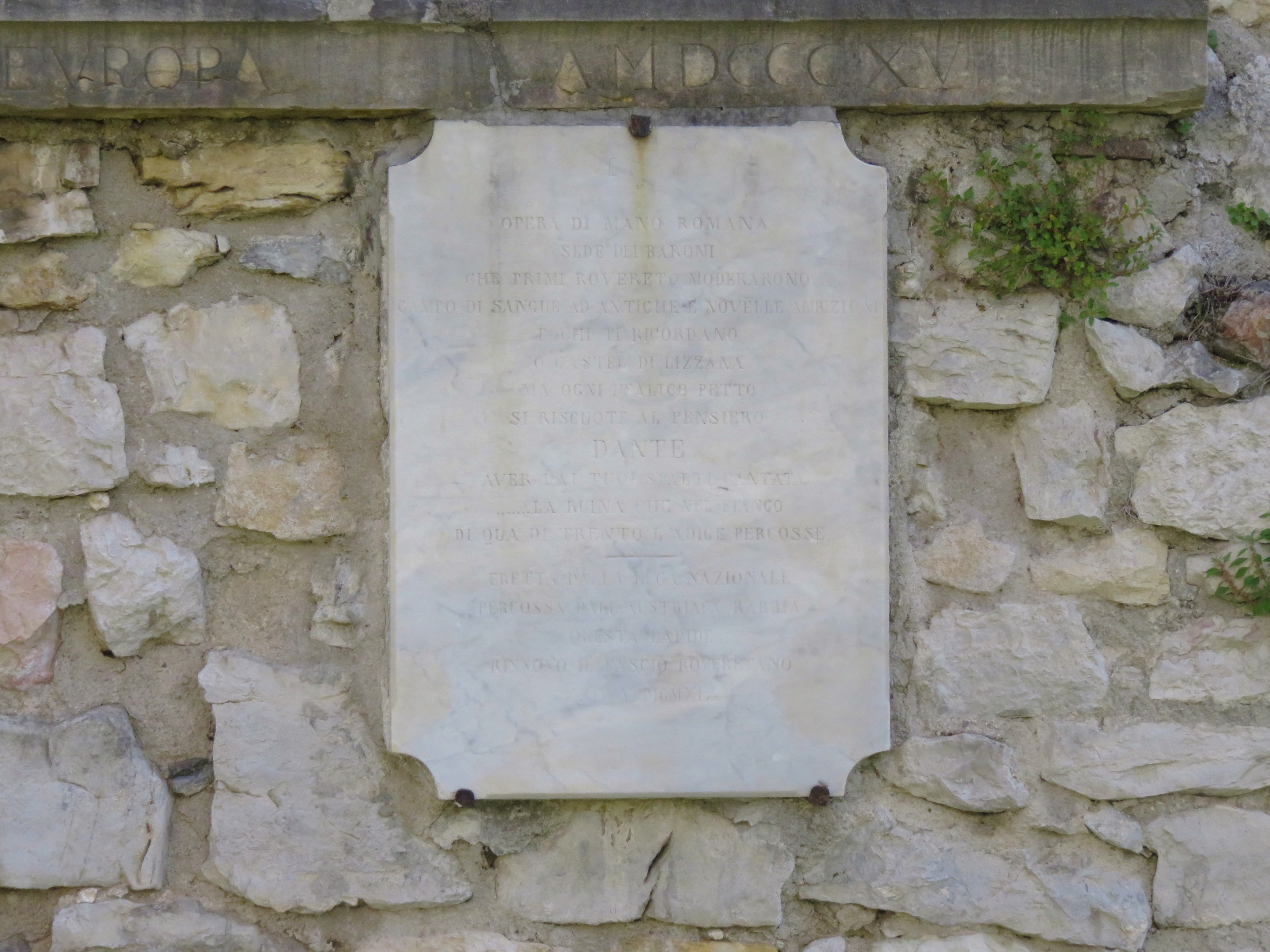 Castel Lizzana. Si trova nel sito di Castel Dante, a Rovereto, noto anche come Ossario. Testo epigrafe: OPERA DI MANO ROMANA SEDE DEI BARONI CHE PRIMI A ROVERETO MODERARONO CAMPO DI SANGUE AD ANTICHE E NOVELLE AMBIZIONI POCHI TI RICORDANO O CASTEL DI LIZZANA MA OGNI ITALICO PETTO SI RISCUOTE AL PENSIERO DANTE AVER DAI TUOI SPALTI CANTATA ……. LA RUINA CHE NEL FIANCO DI QUA DA TRENTO L’ADIGE PERCOSSE ,, --- ERETTA DALLA LEGA NAZIONALE PERCOSSA DALL’AUSTRIACA RABBIA QUESTA LAPIDE RINNOVO' IL FASCIO ROVERETANO XXIV. V. MCMXIX.